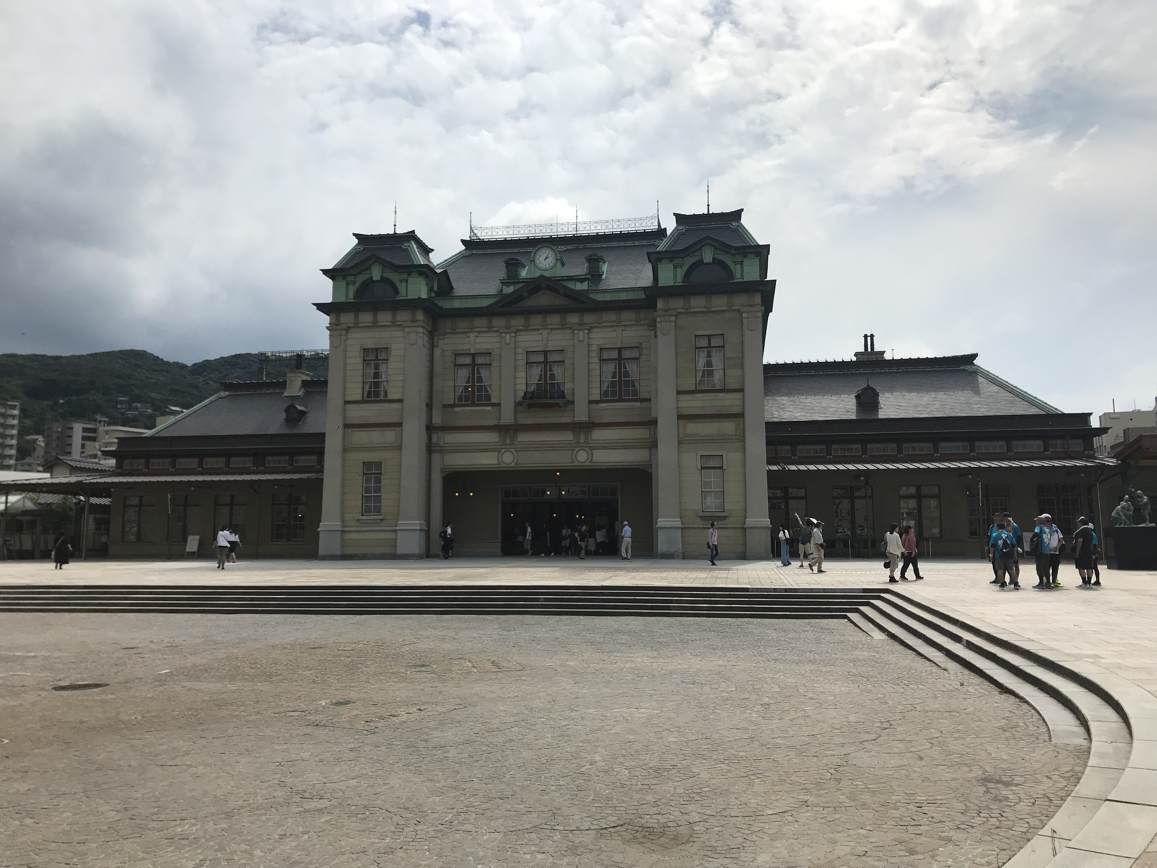 門司港駅の駅舎